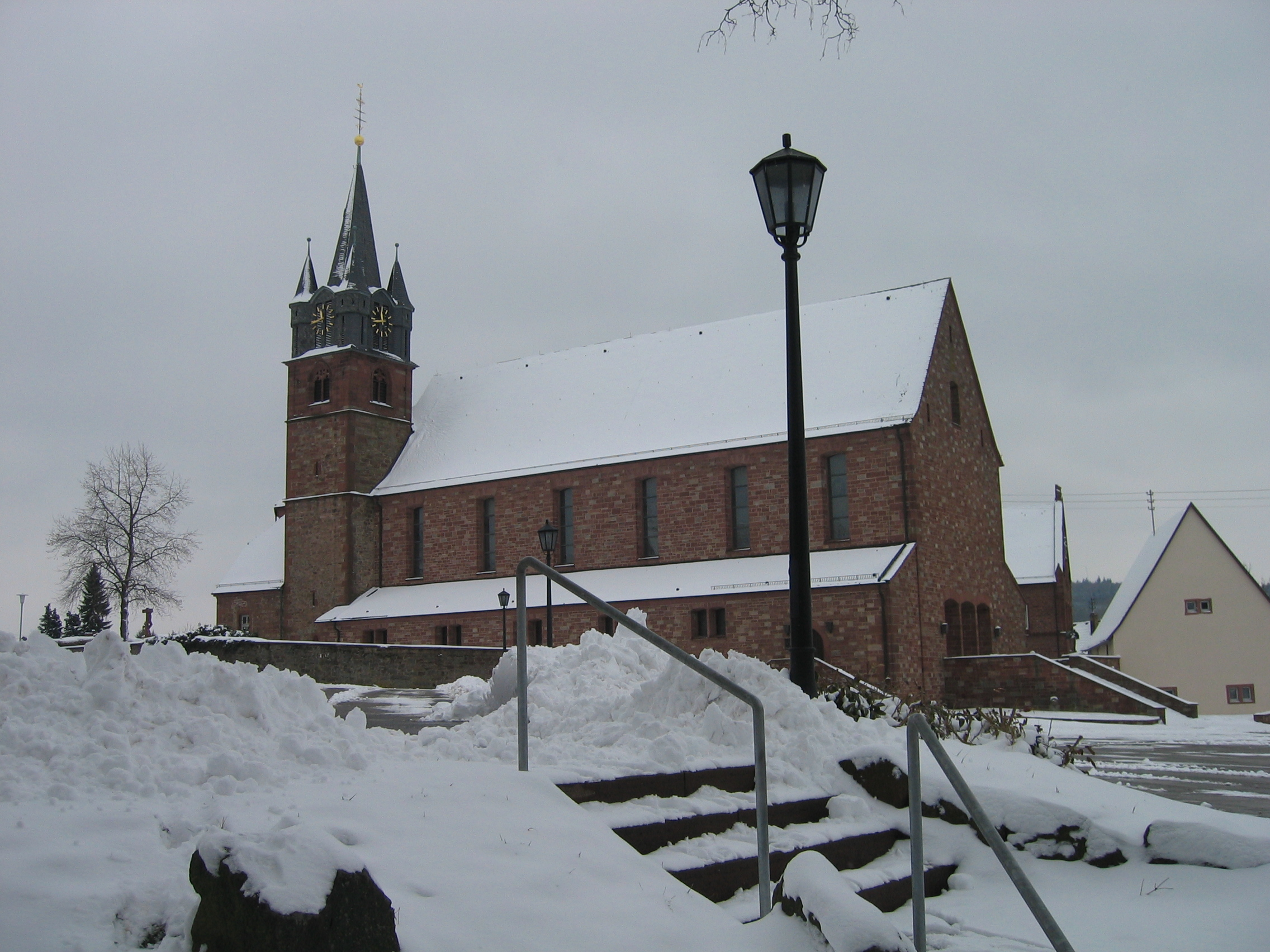 Kirche St.Martin zu Külsheim. Ansicht vom Schlossplatz aus.